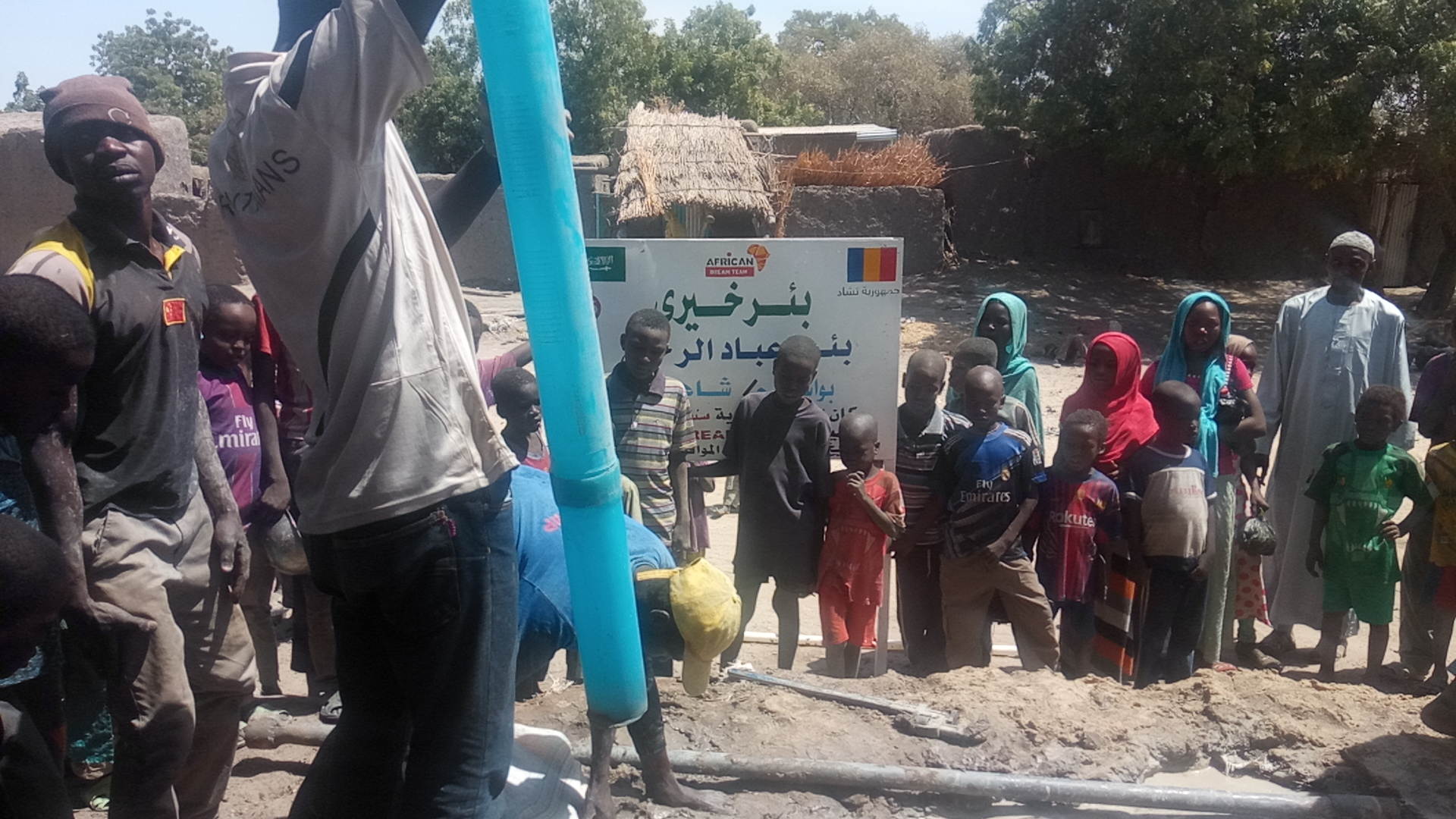 Le moment de joie des personnes complétant le forage de puits dans leurs villages et leur joie This is an image with the theme "Play" from: Chad